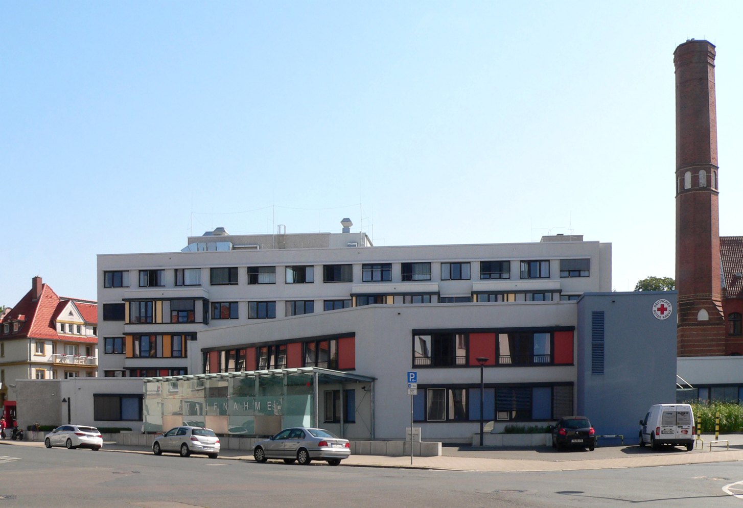 Bettenhaus des Clementinenhauses Hannover